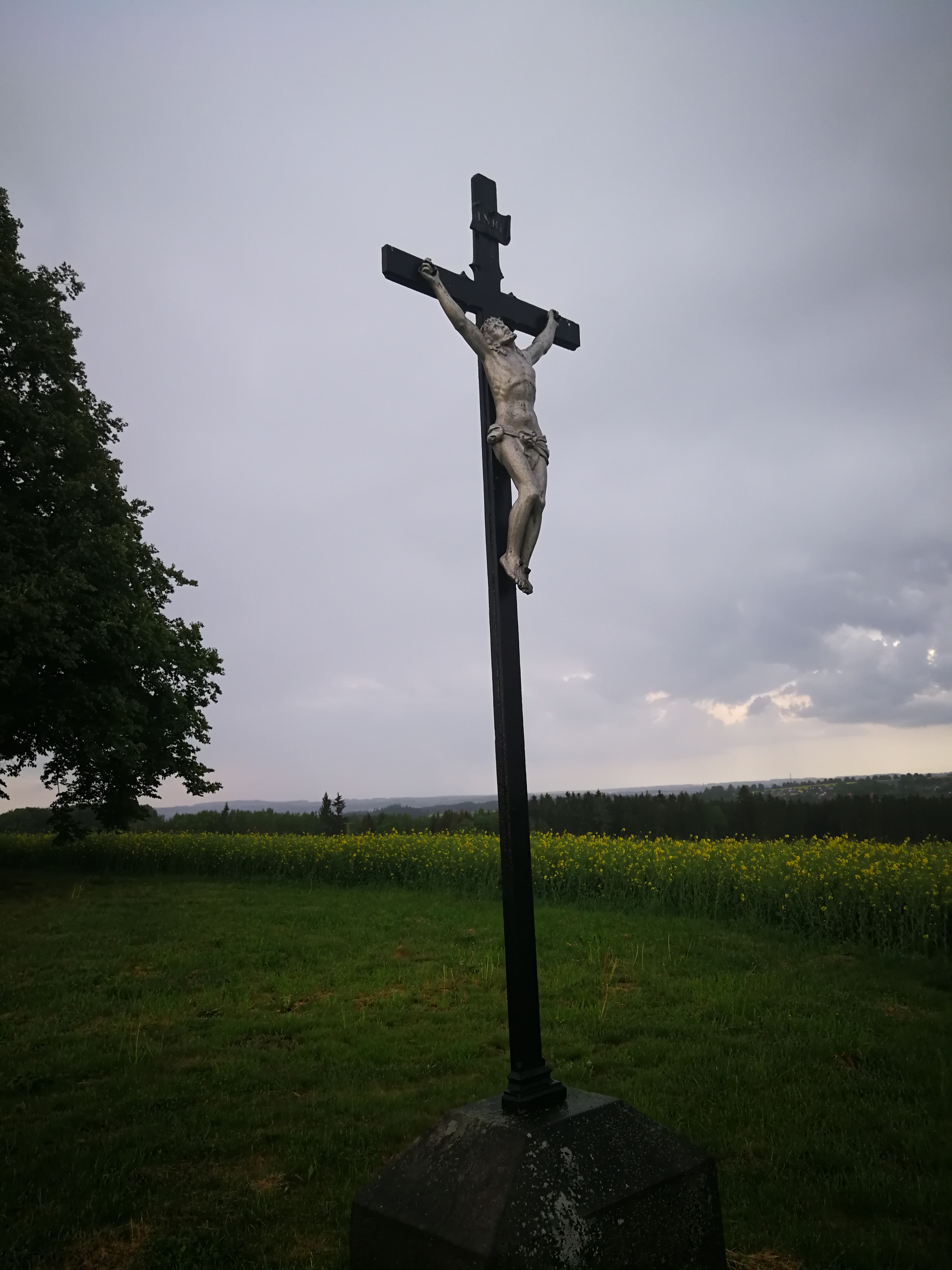 Železný kříž